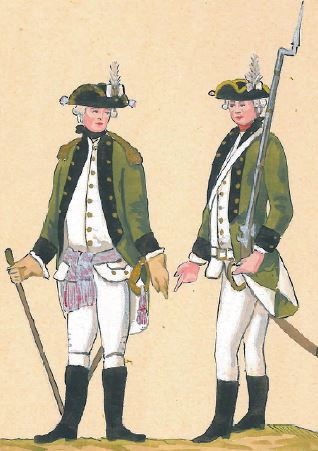 29. Korpus artylerii w mundurach paradnych (oficer i szeregowy korpusu artylerii koronnej w mundurach paradnych